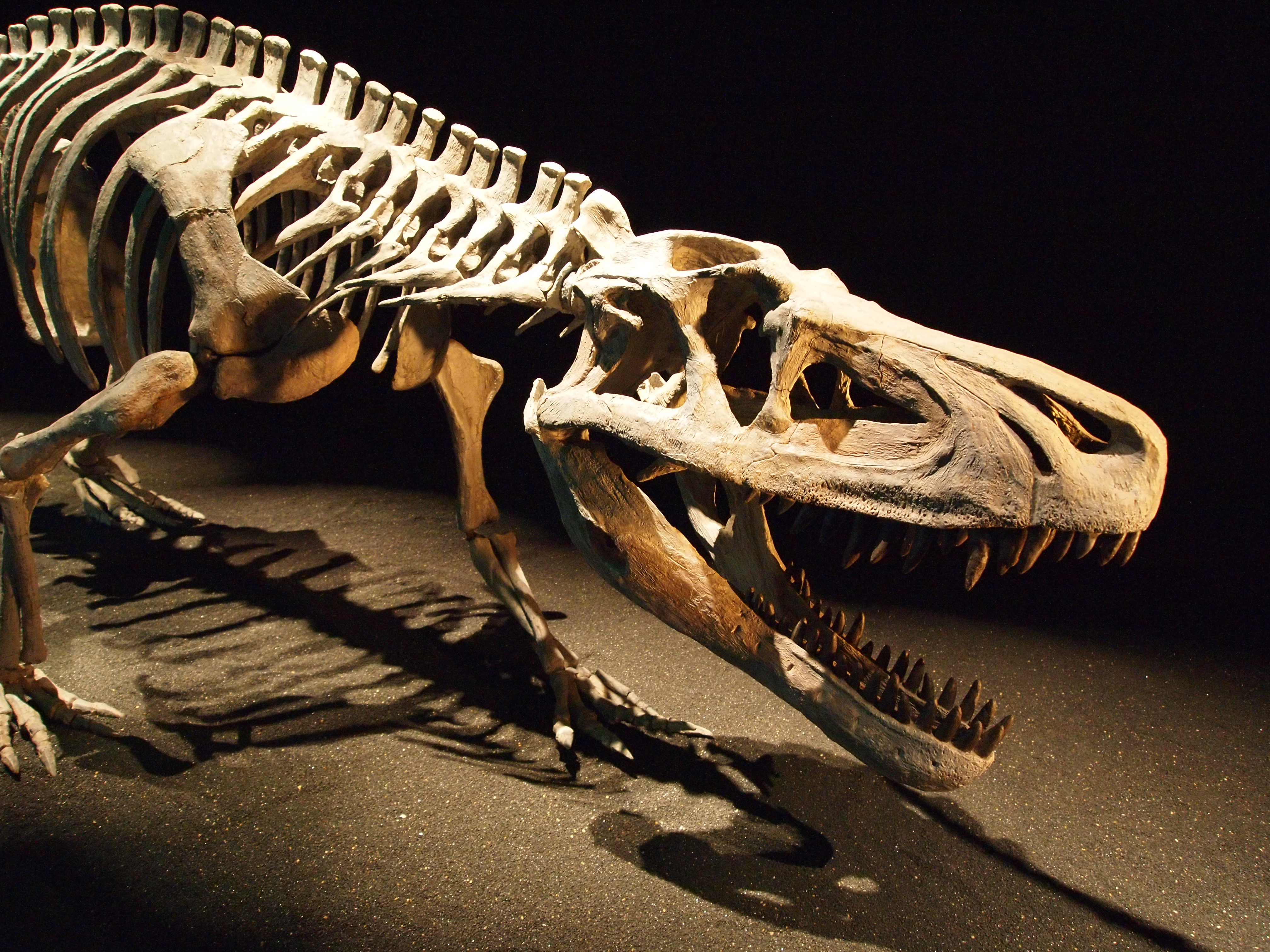 Saurosuchus 地球最古の恐竜展 森アーツセンターギャラリー